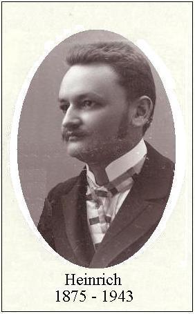 fotografie Jindřicha Haužvice rok cca 1898